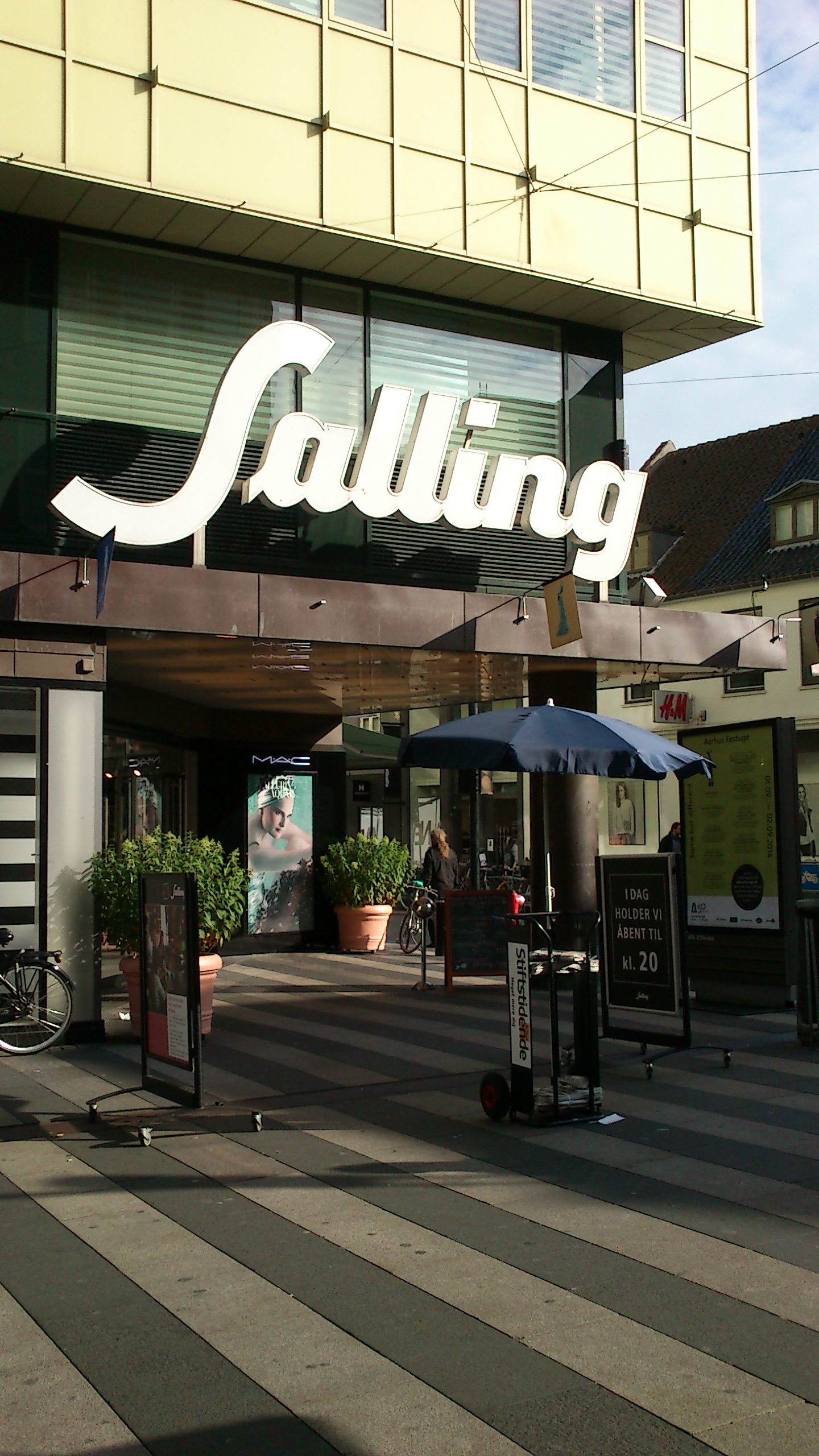 Én af fire indgange til Salling på Strøget i Aarhus.